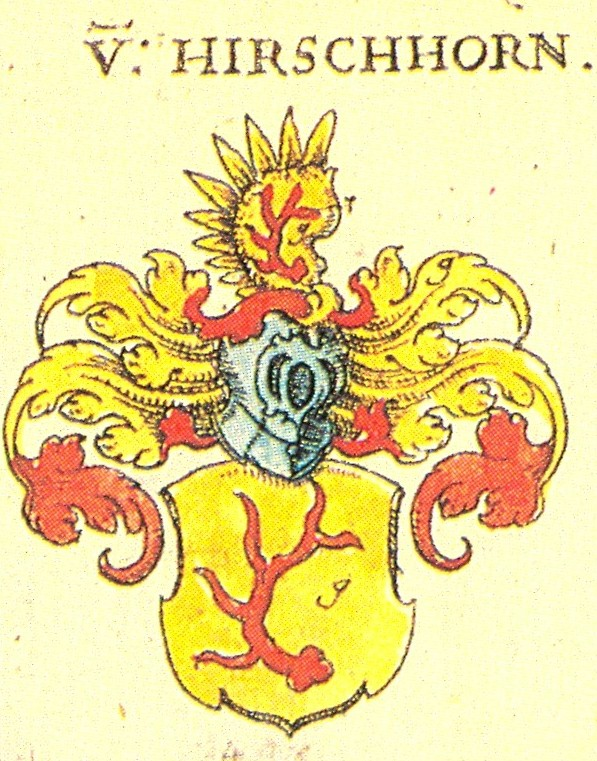 Ritterschaft und Adel in Schwaben von Hirschhorn